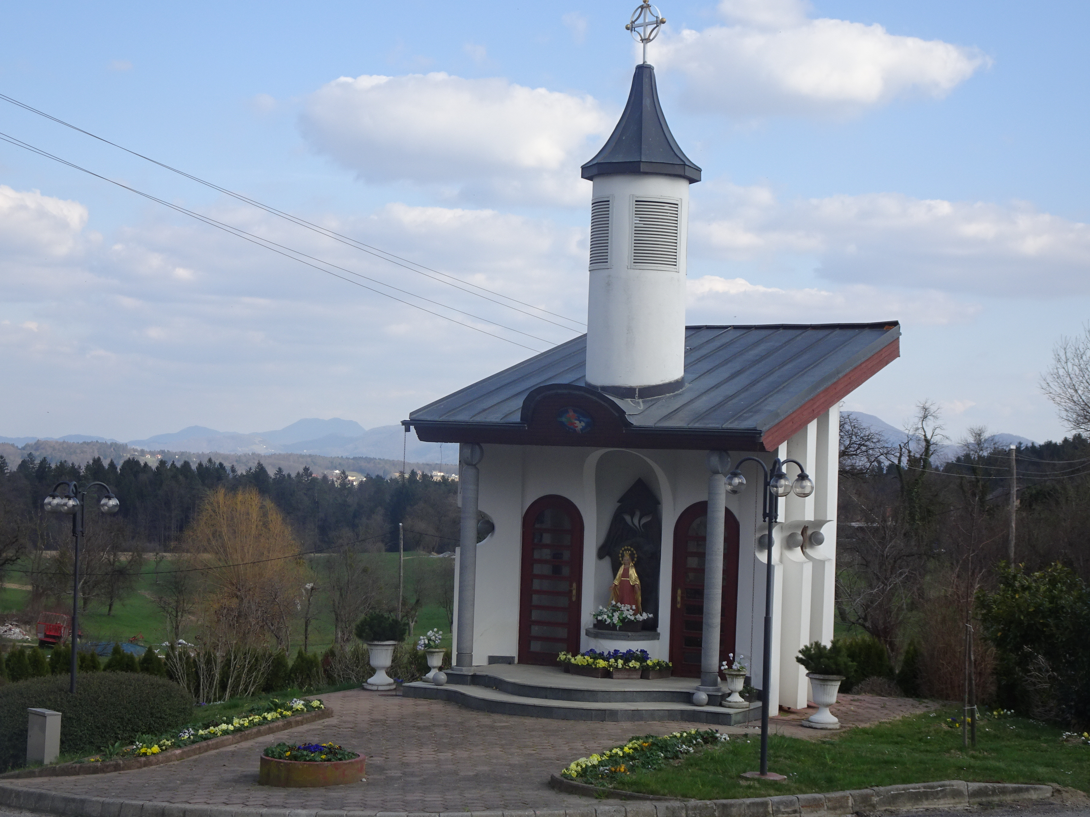 Kapela na Brdu, Občina Slovenske Konjice